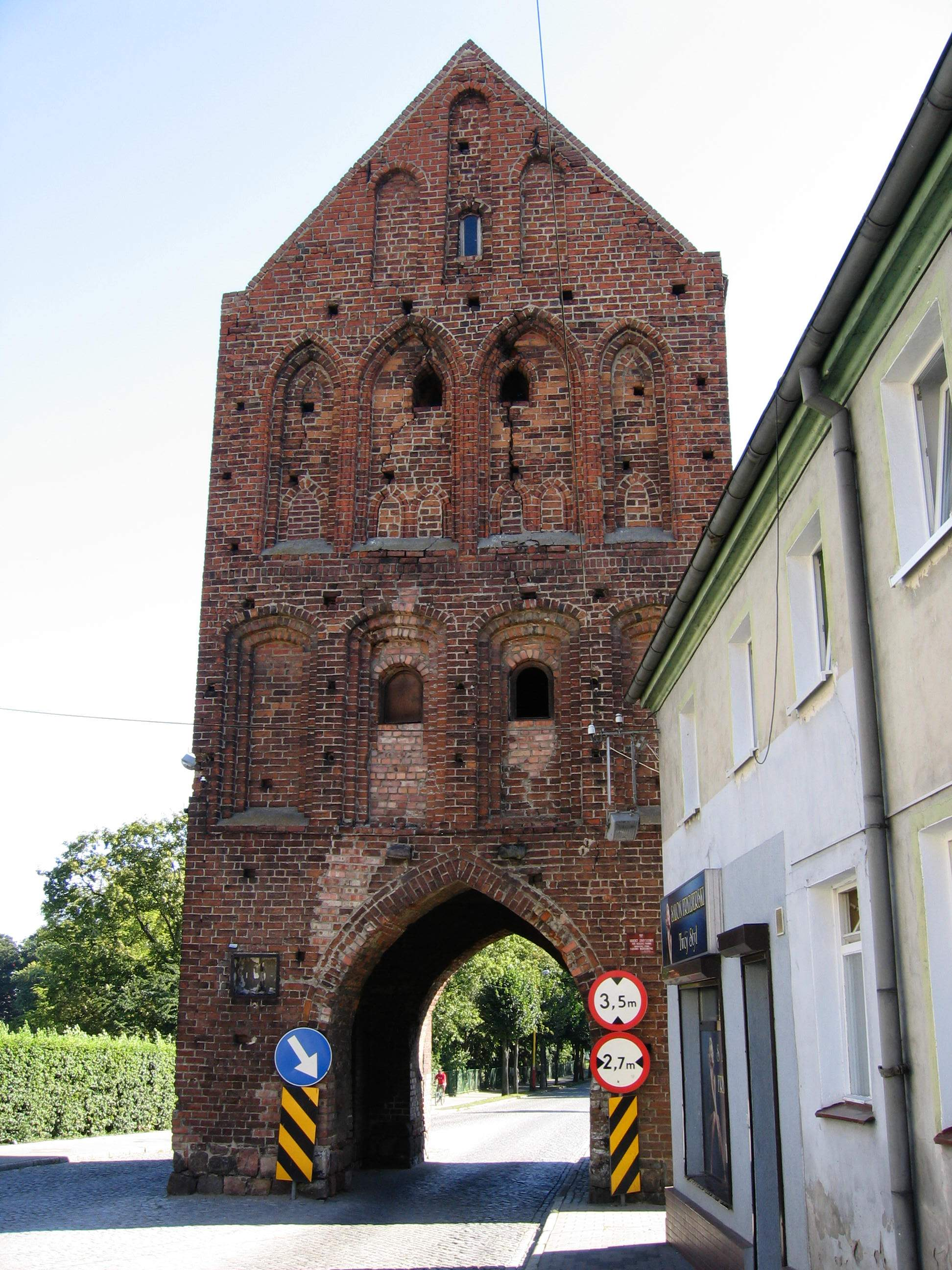 Lipiany - Brama Myśliborska (Mostowa) w zespole murów obronnych